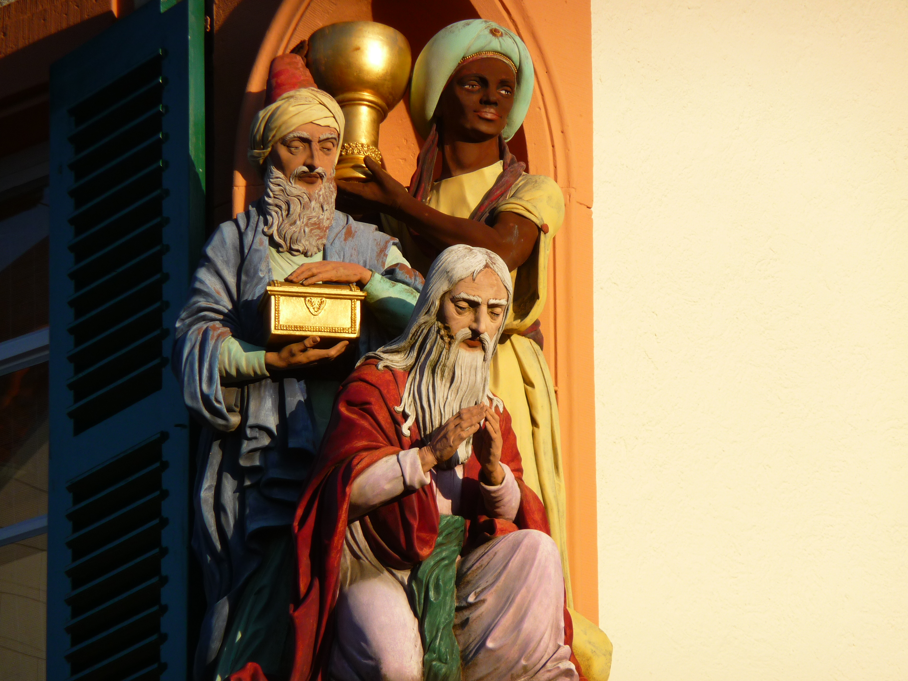 Schwetzingen - Darstellung der Heiligen Drei Könige an einem Gebäude in der Dreikönigstraße